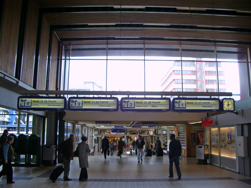 de corridor naar Hoog Catherijne